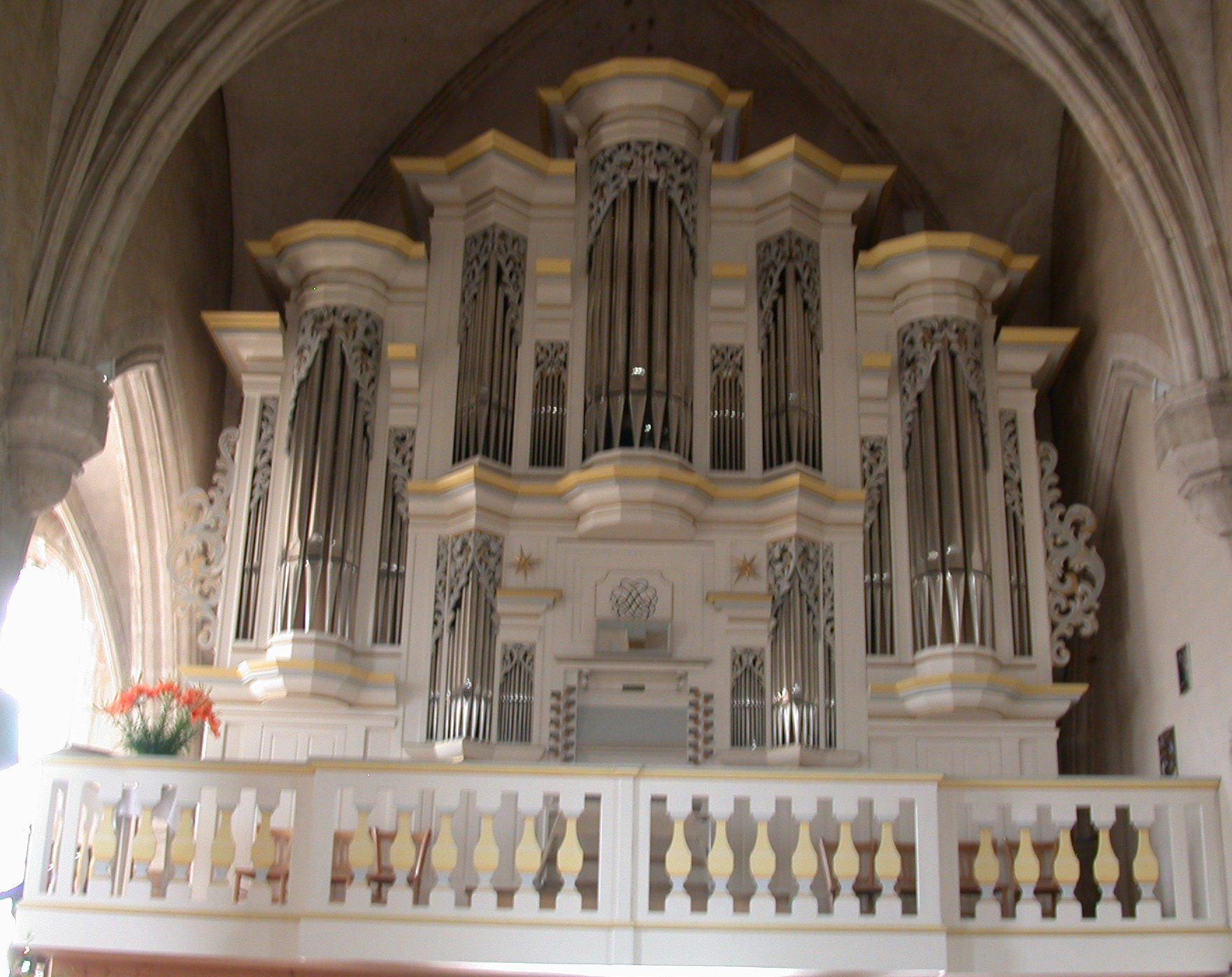 Photo prise par moi-même le 15 août 2006 lors du festival Bach en Combrailles